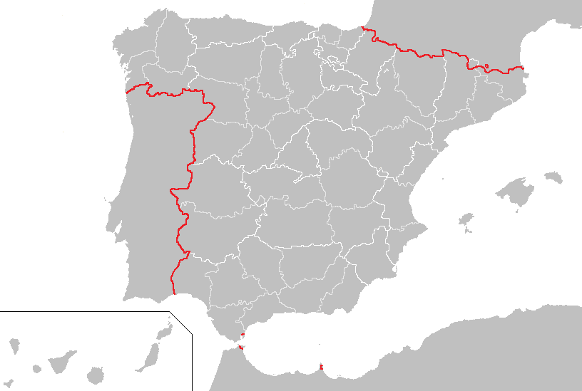 Fronteras de España.